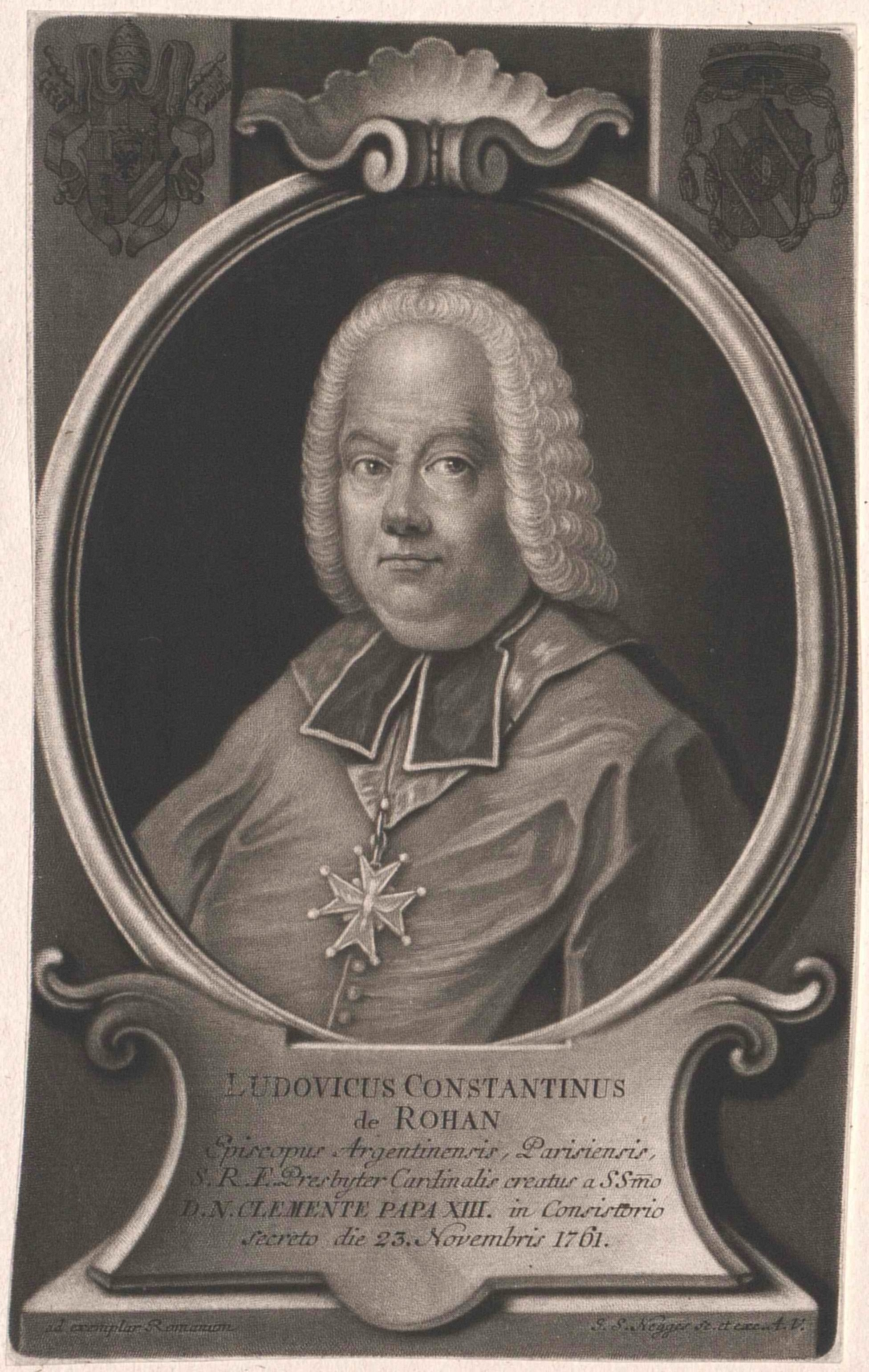 Porträt des Kardinals Louis César Constantin de Rohan-Guéméne, Bischof von Straßburg